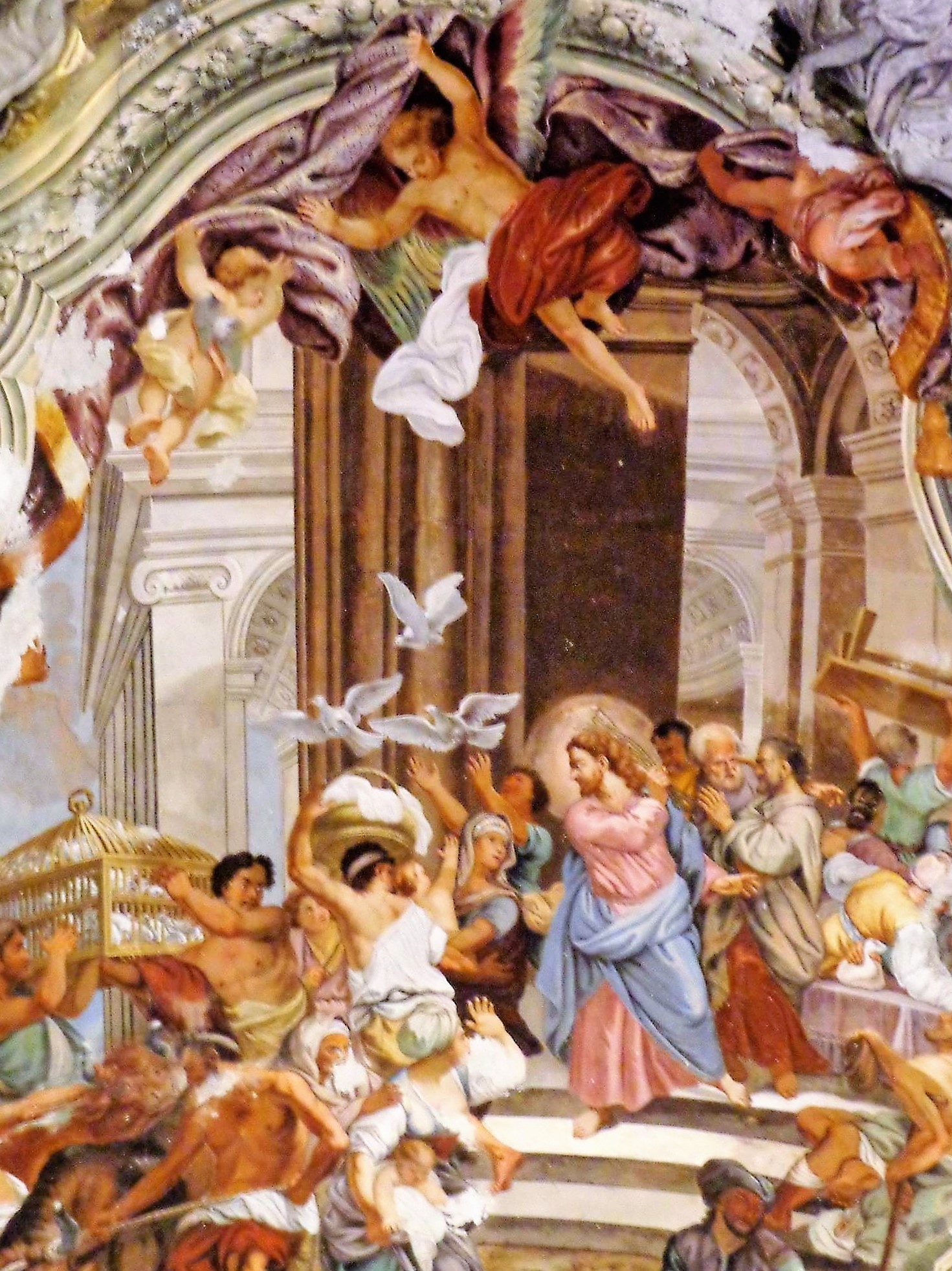 Affresco volta dettaglio, foto già presente su account personale FB